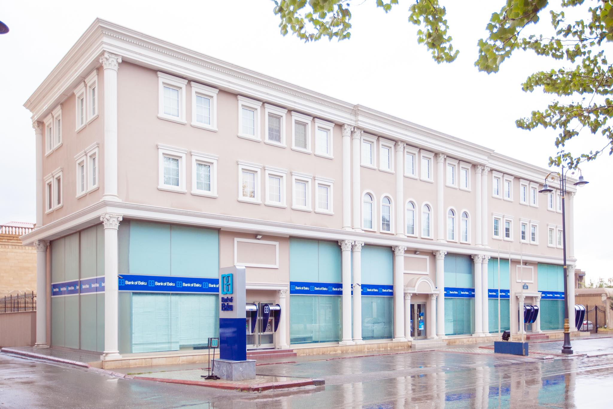 Bank of Baku - Baş İdarə